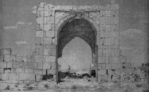 Белеули в 20-м веку